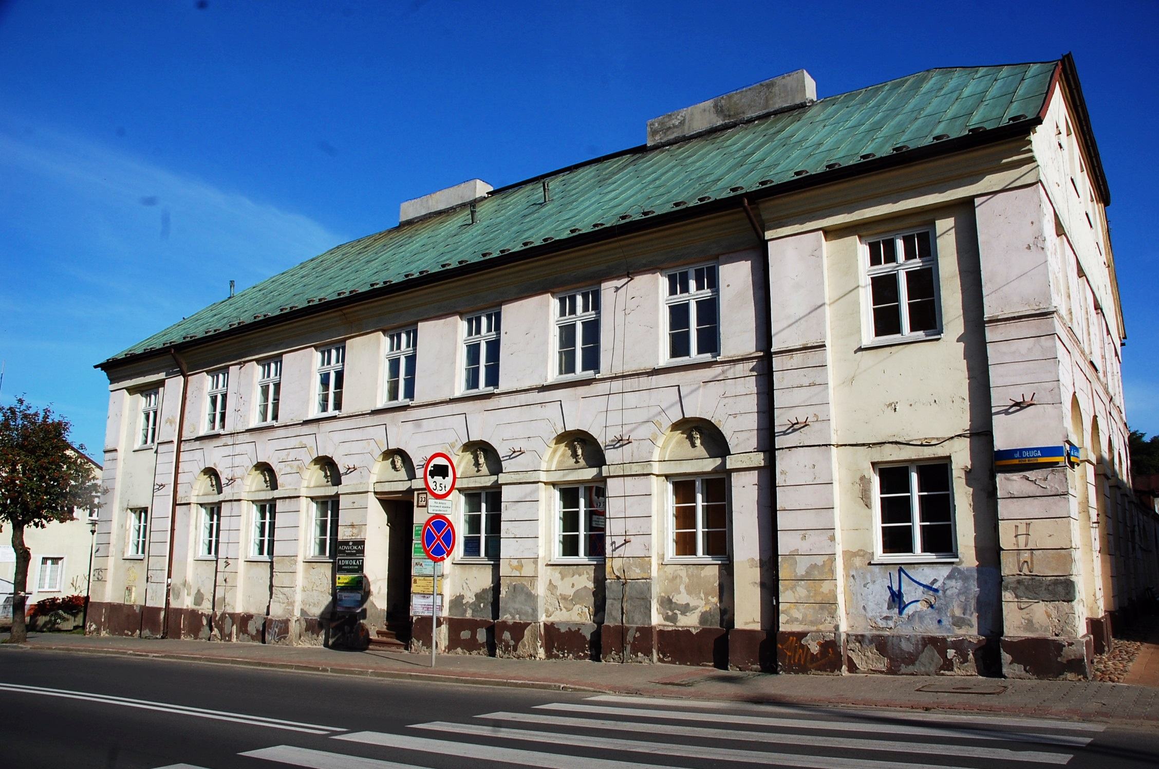 Zgierz, dom, 2 poł. XIX